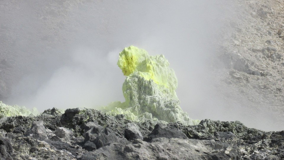 柱状に成長した硫黄の柱（秋田県玉川温泉、源泉）